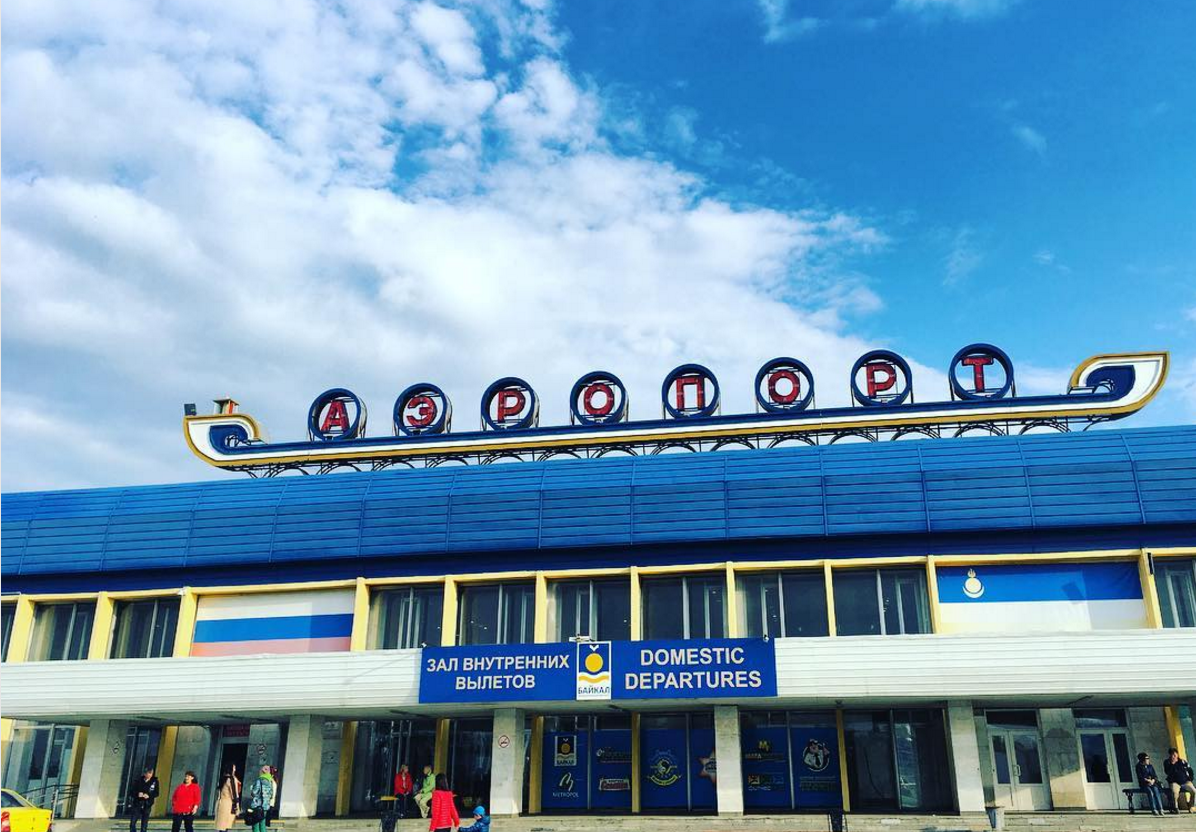 Baikal International Airport, Ulan-Ude